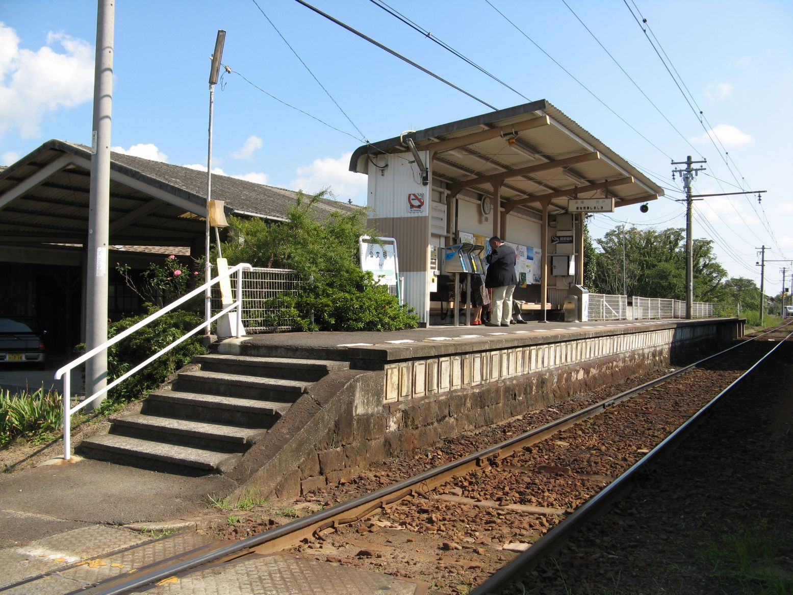 公文明駅 長尾方を望む